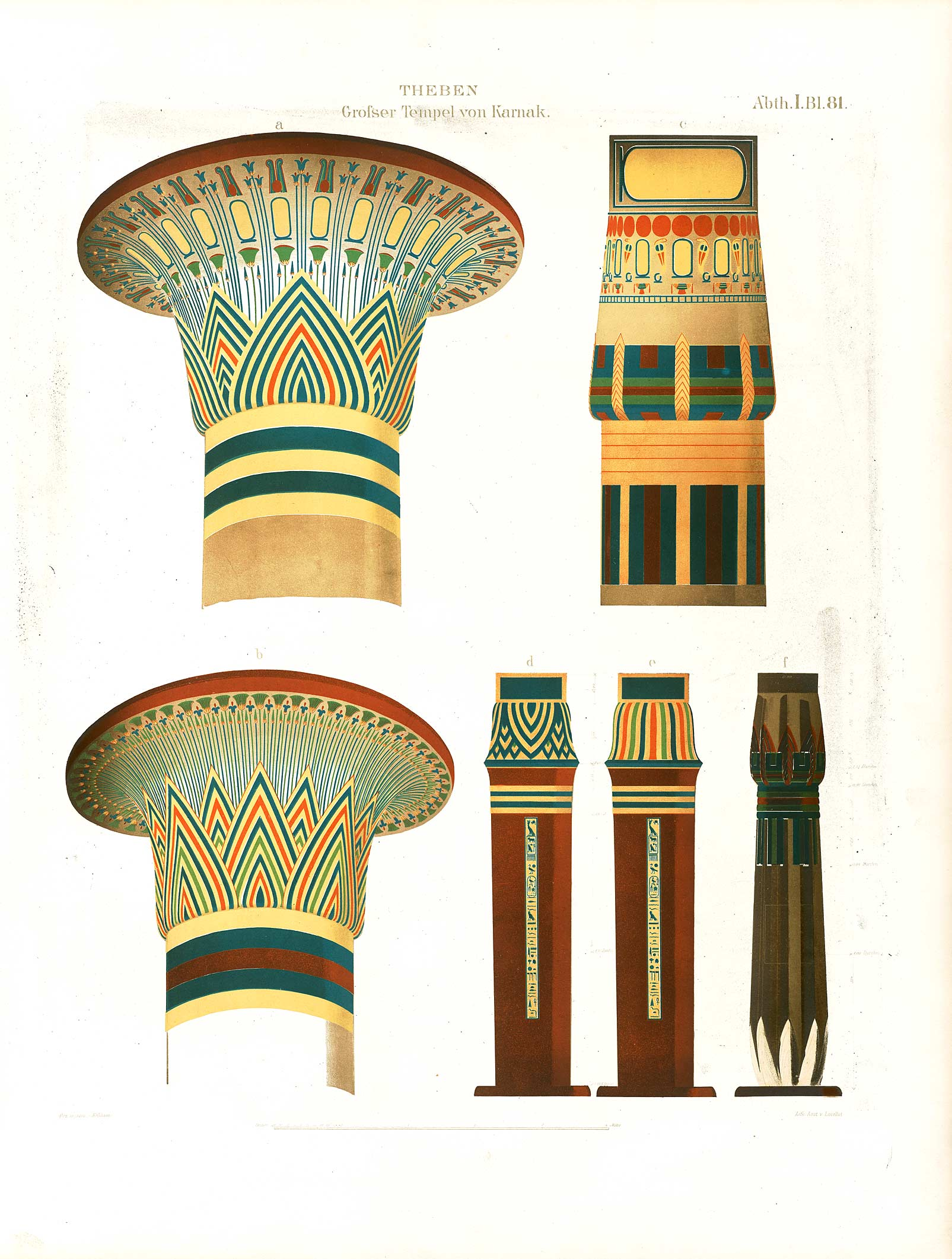 Denkmaeler aus Aegypten und Aethiopien nach den Zeichnungen der von Seiner Majestät dem Koenige von Preussen, Friedrich Wilhelm IV., nach diesen Ländern gesendeten, und in den Jahren 1842–1845 ausgeführten wissenschaftlichen Expedition auf Befehl Seiner Majestät